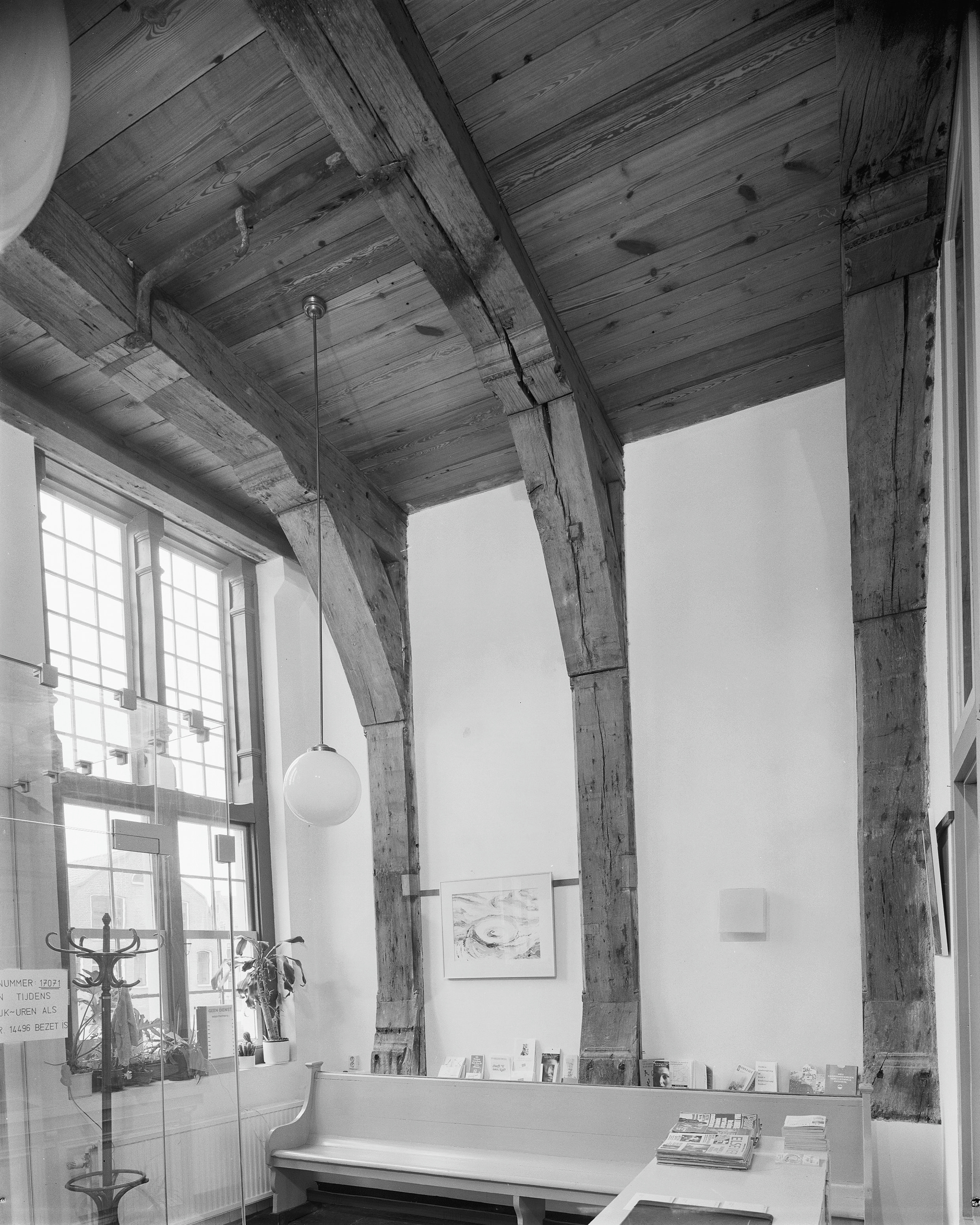 INTERIEUR, VOORHUIS, HOUTSKELET